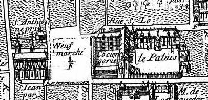 Eglise Saint-Jean-sur-Renelle, place du Marché-Neuf et palais de Justice